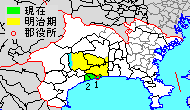 Map of Naka District, Kanagawa, Japan